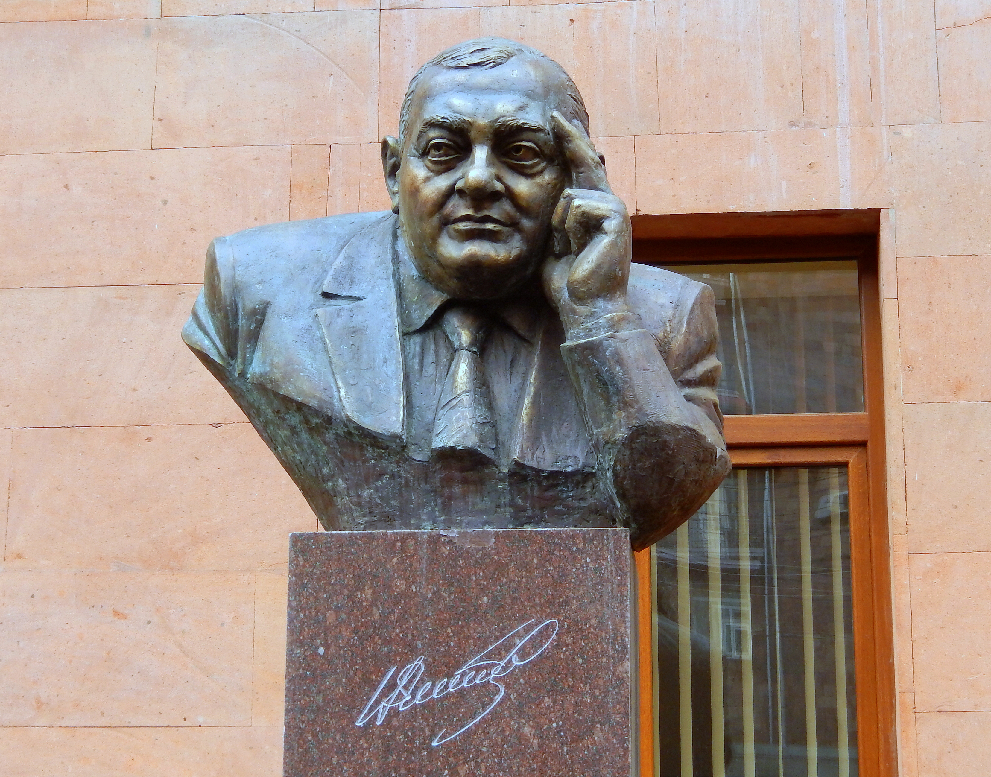 Ճարտարապետ Ալբերտ Սոխիկյան